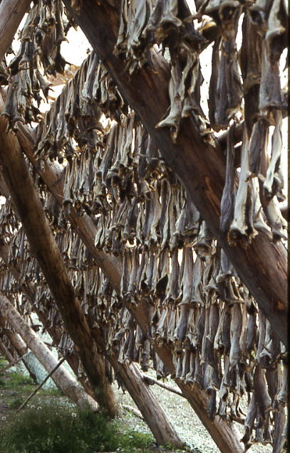 Hammerfest (Norvège). Poissons